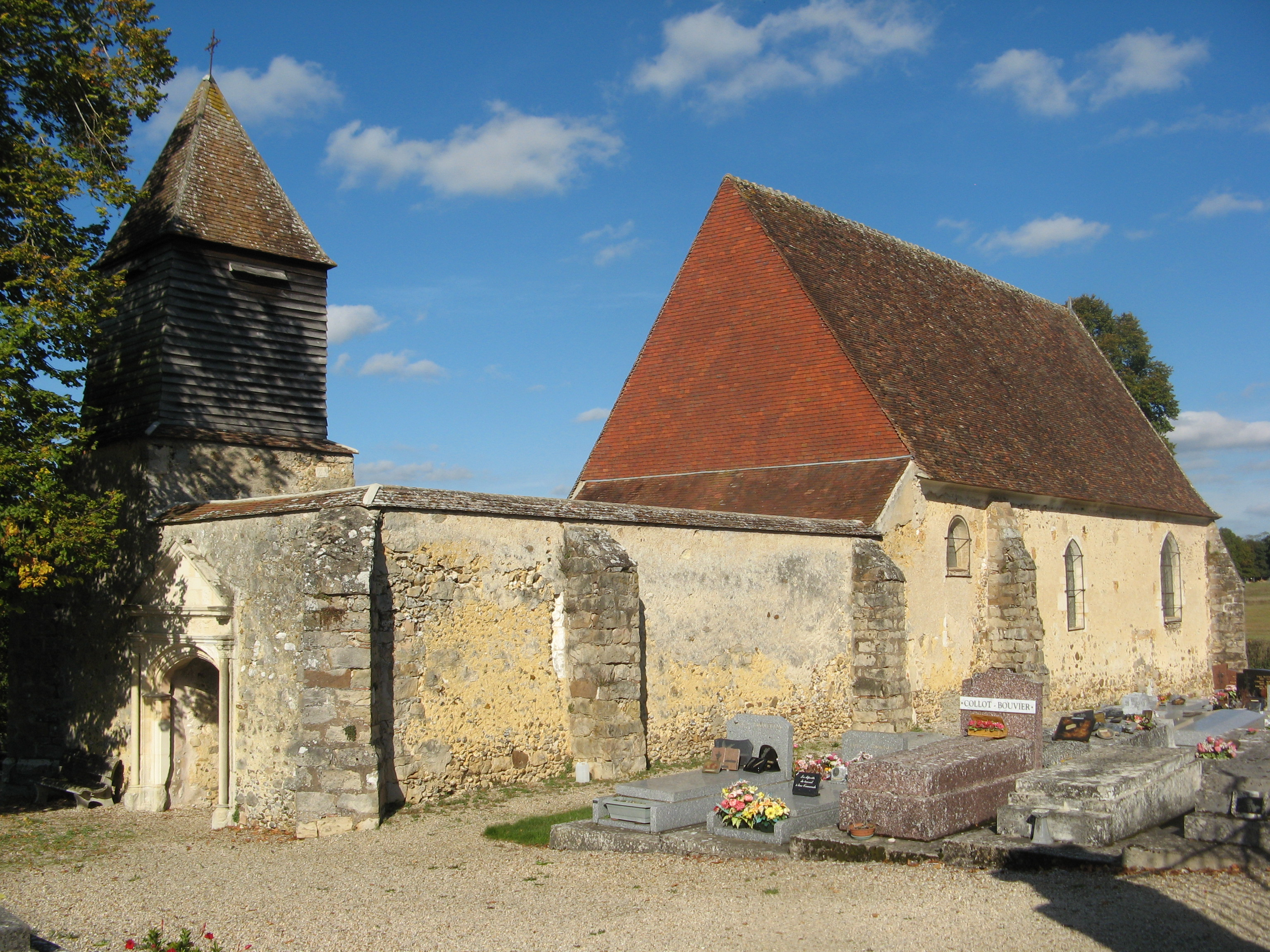 Saligny (Yonne) : église